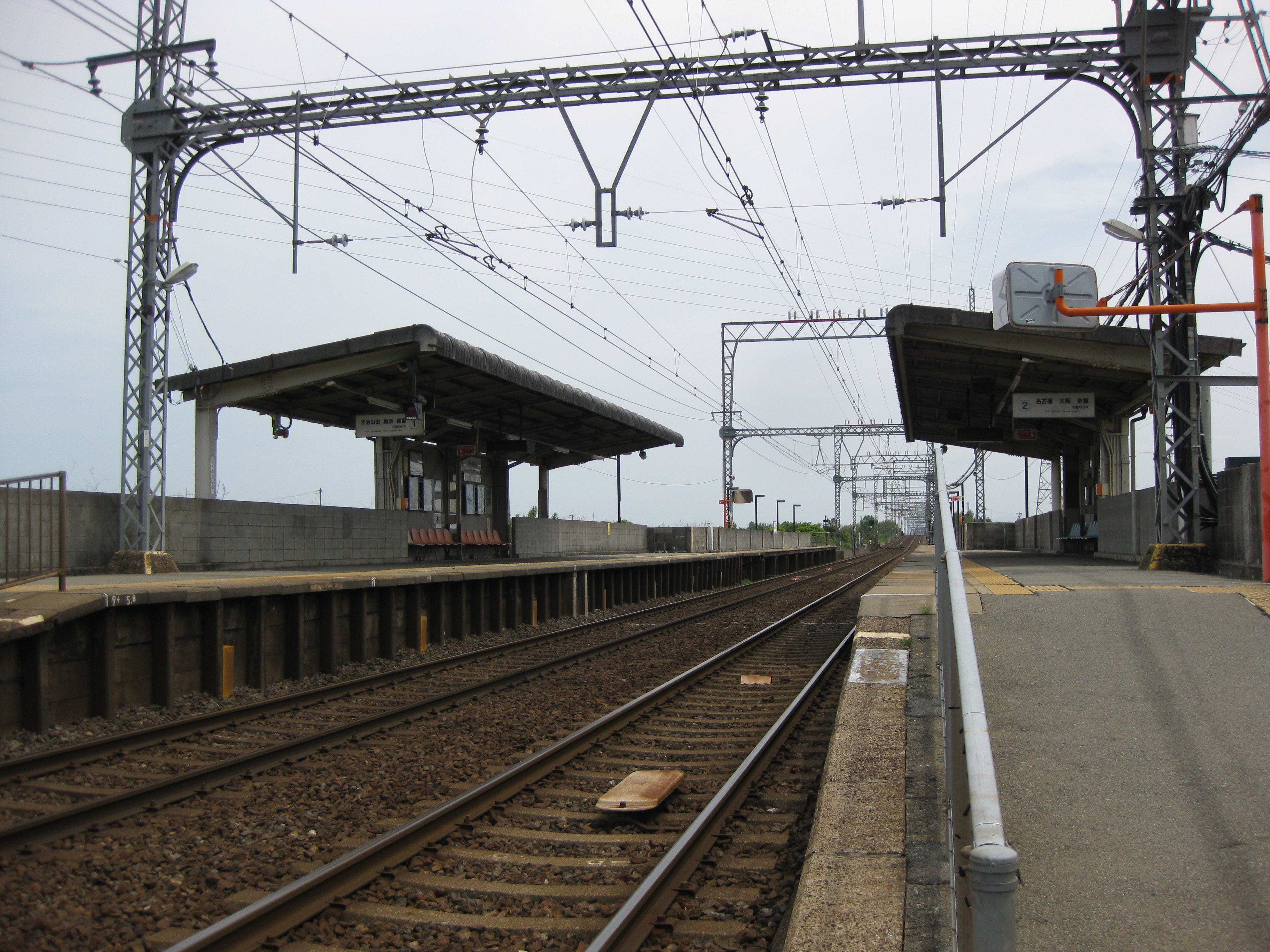 伊勢中原駅プラットホーム